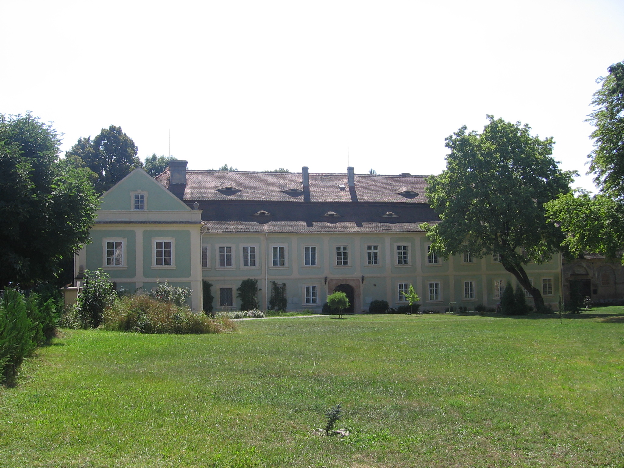 Zámek Luhov, okres Plzeň-sever